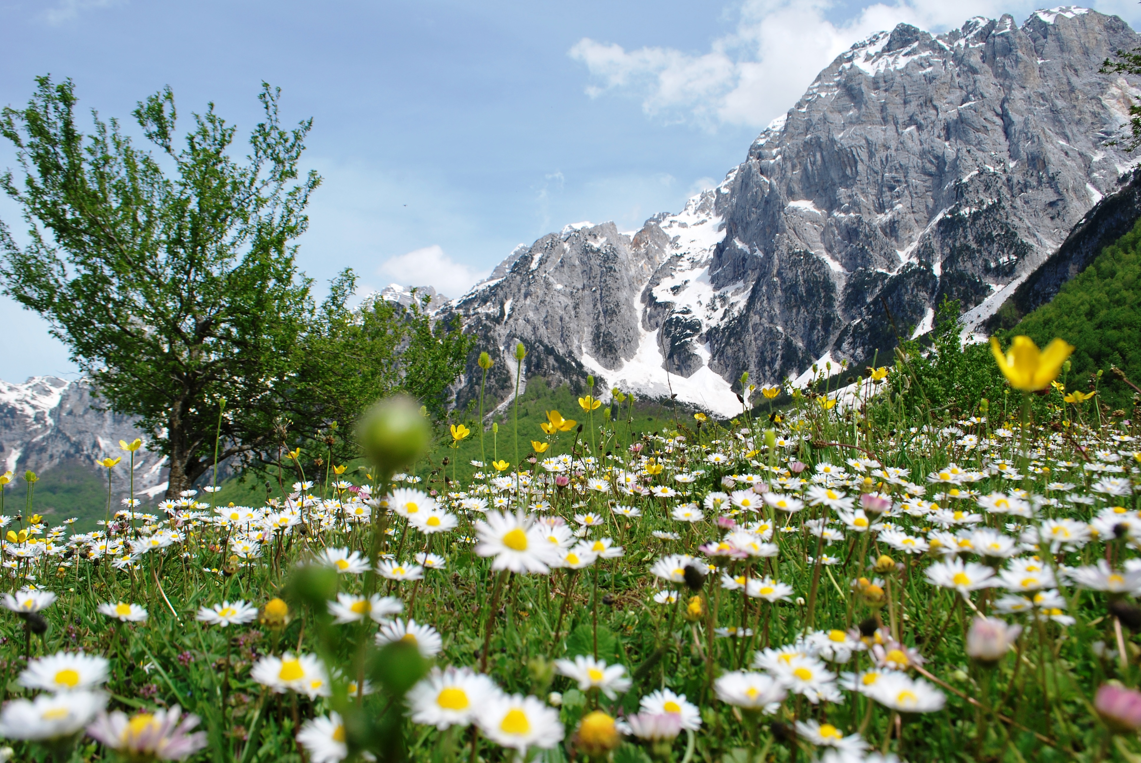 Lugina e Valbones, Tropoje